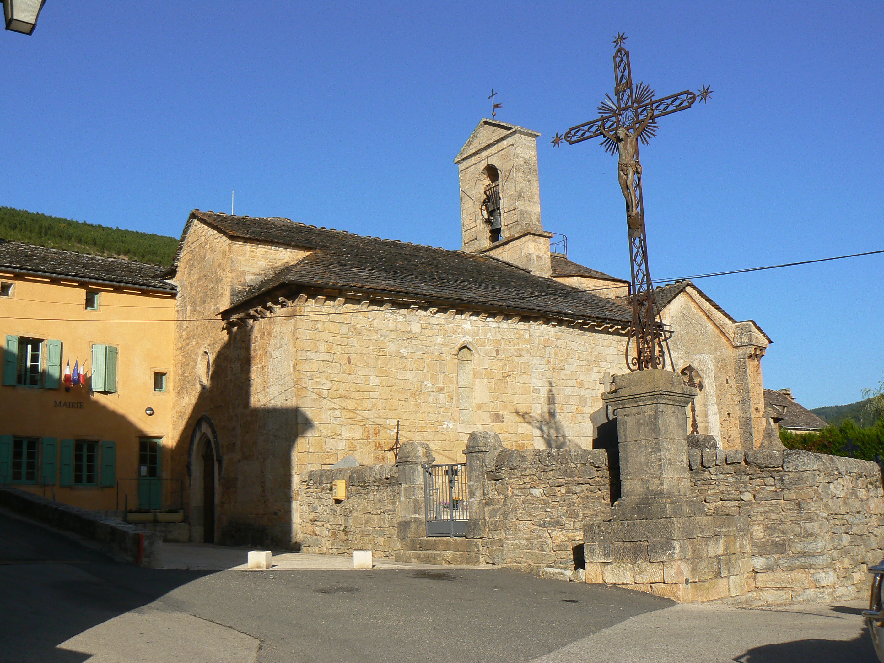 Eglise de la commune de Lanuéjols en Lozère